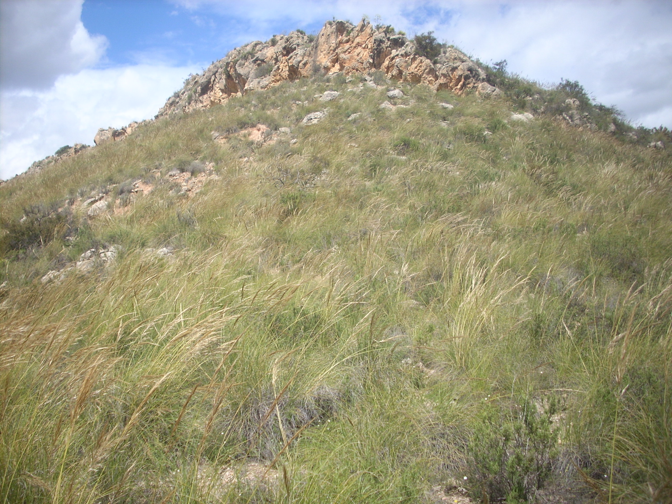 Vista de la Cumbre donde se encuentra situado el yacimiento arqueológico de Vilerda